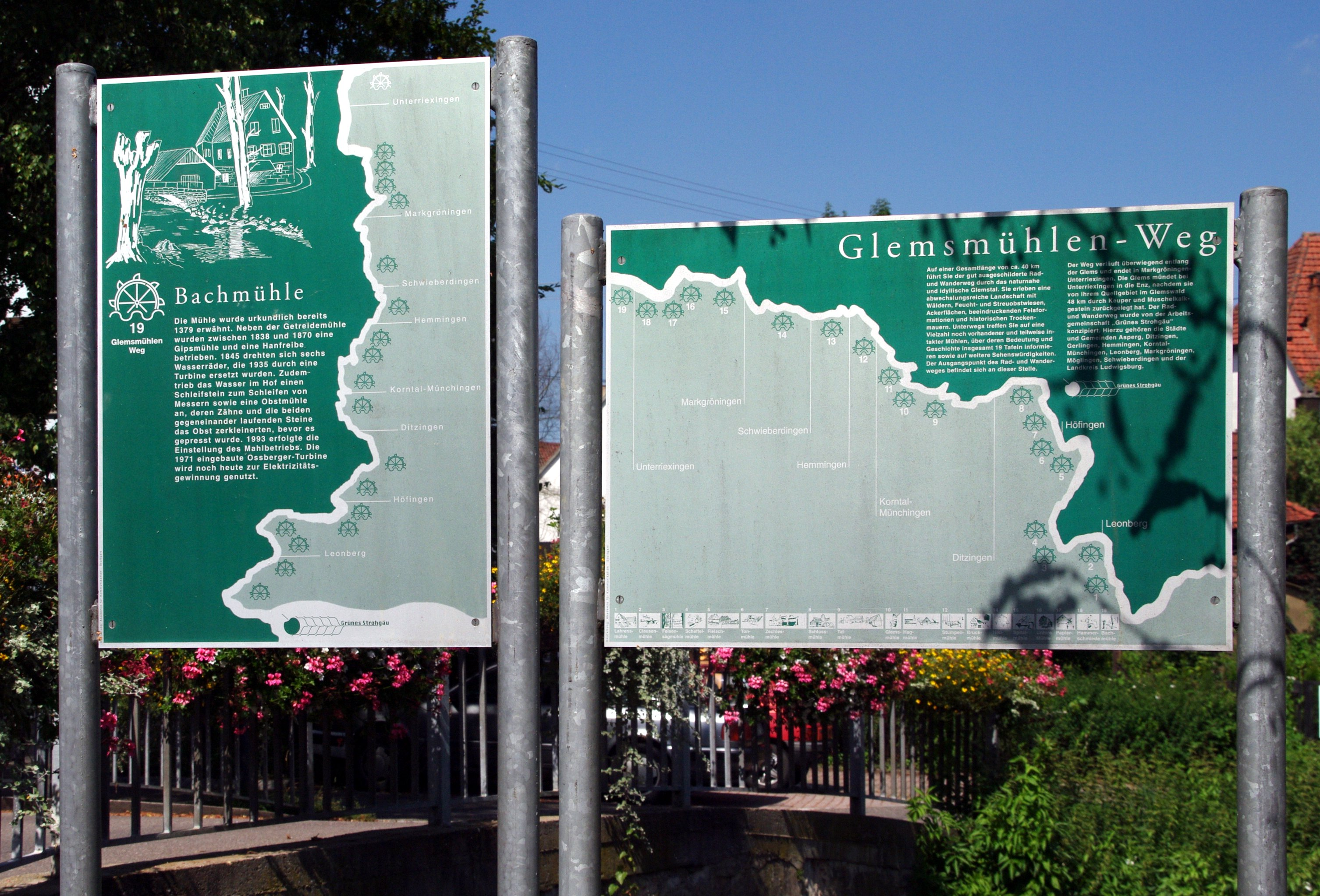 Infotafeln zum Glemsmühlenweg sowie zur Bachmühle in Unterriexingen